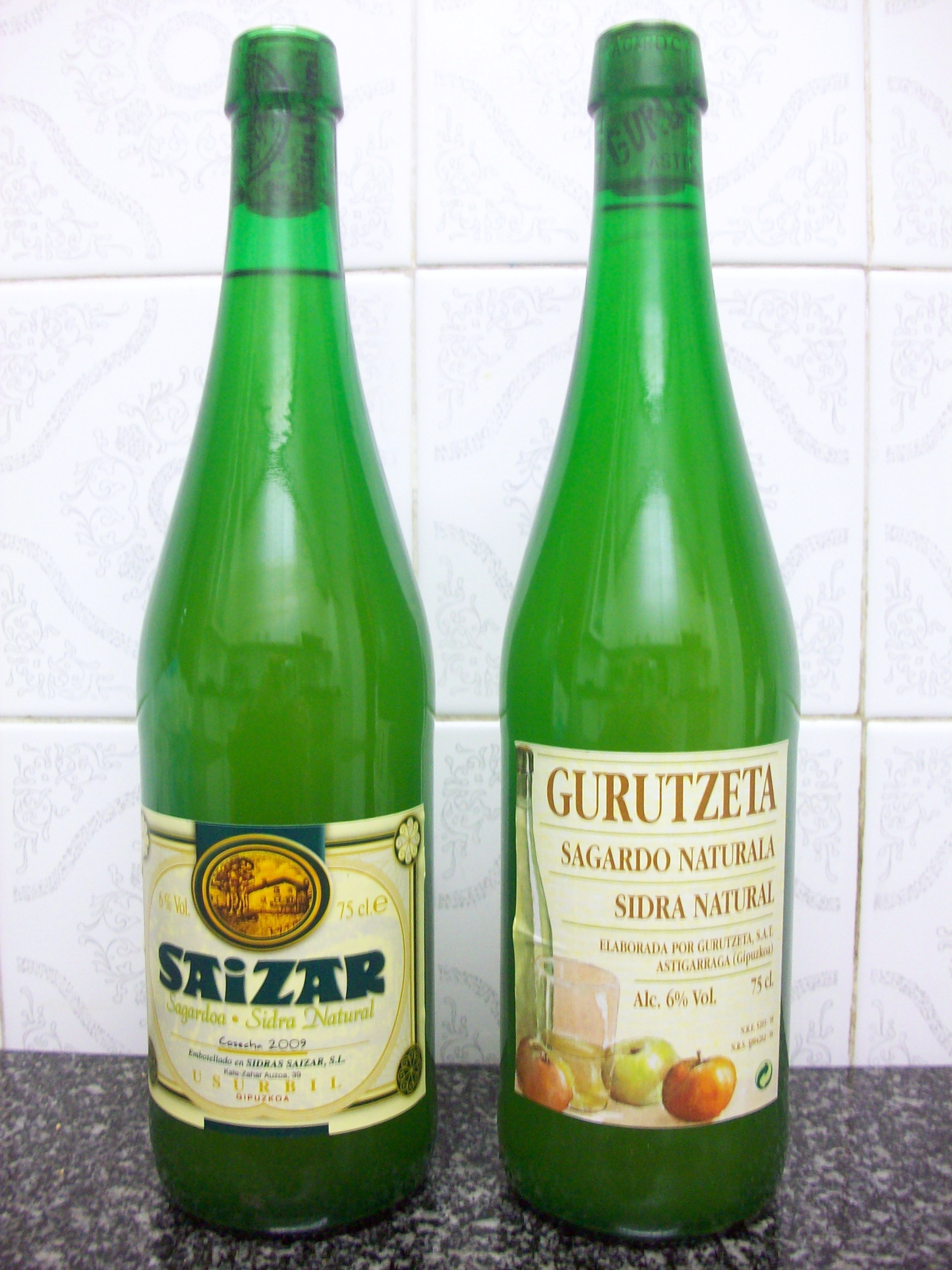 Euskal Sagardoa: Gipuzkoako Astigarraga eta Usurbil udalerrietako sagardoa. Euskal Herria. / Basque Cider: Cider from Astigarra and Usurbil villages, in Guipuscoa. Basque Country.